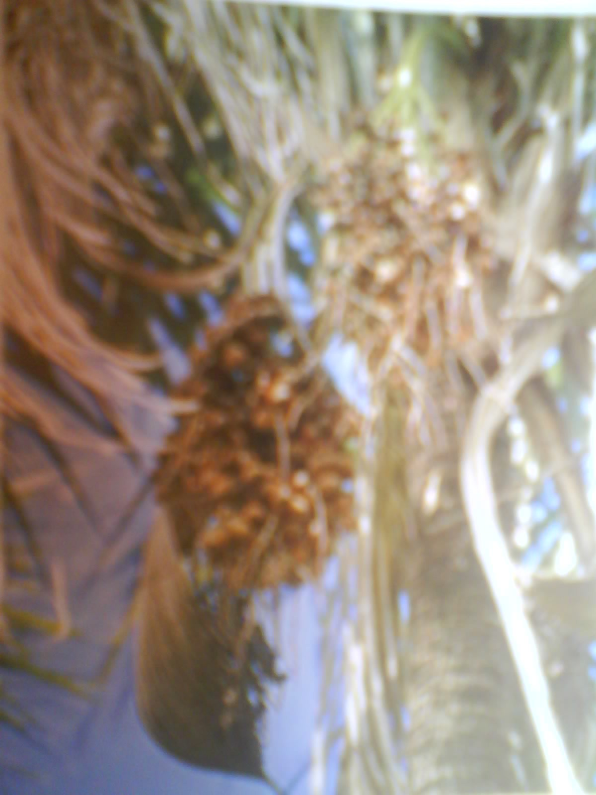 Panícula em Syagrus cearensis